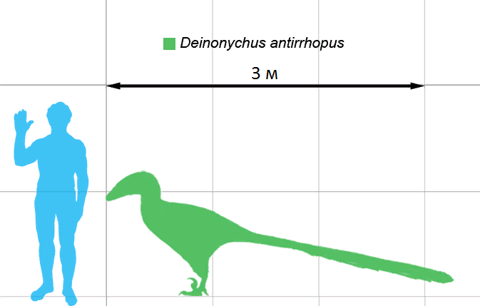 Дейноних (Deinonychus) в сравнении с человеком. Каждый сегмент клетки равен 1 м².